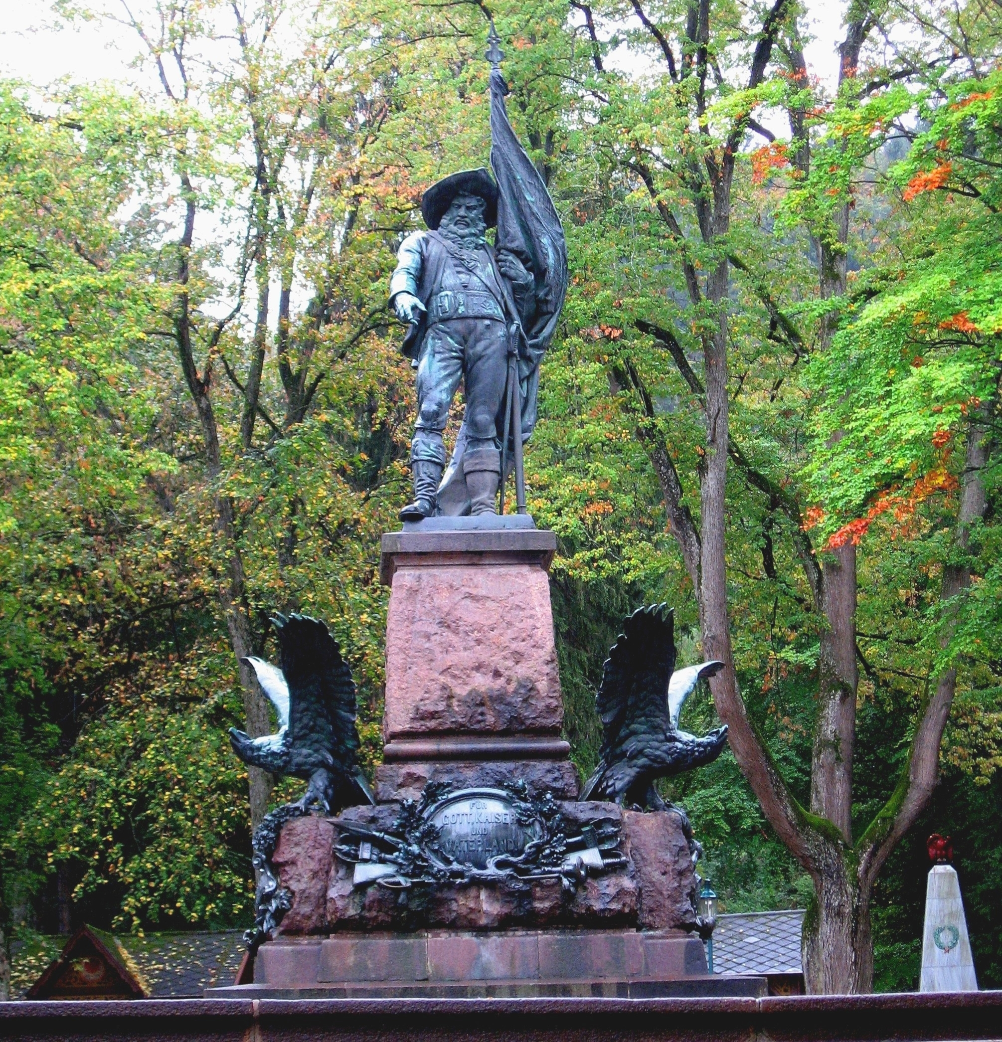 Österreich, Innsbruck, Bergisel, Andreas-Hofer-Denkmal. Bildhauer: Heinrich Natter